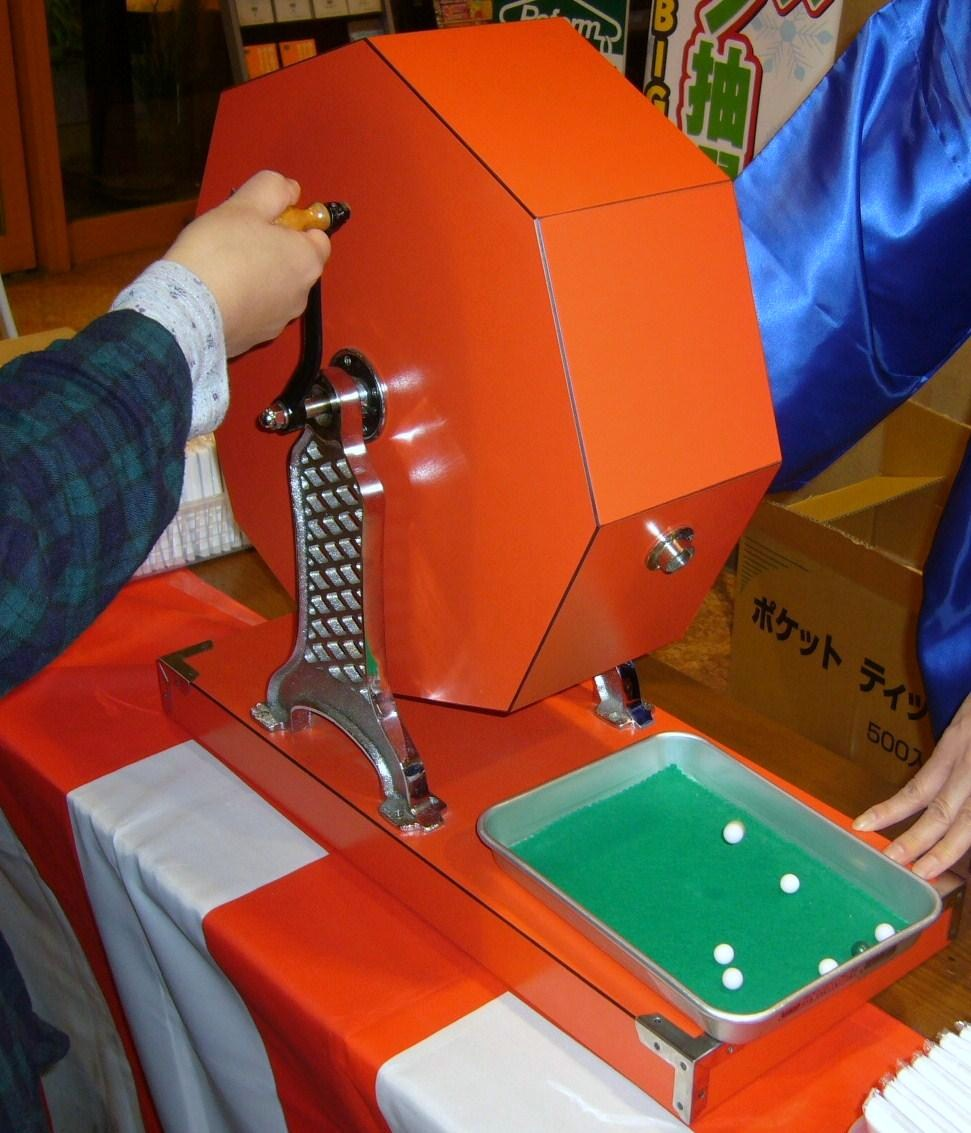 Revolving lottery machine,kaitenshiki-cyusenki(回転式抽選機),japan